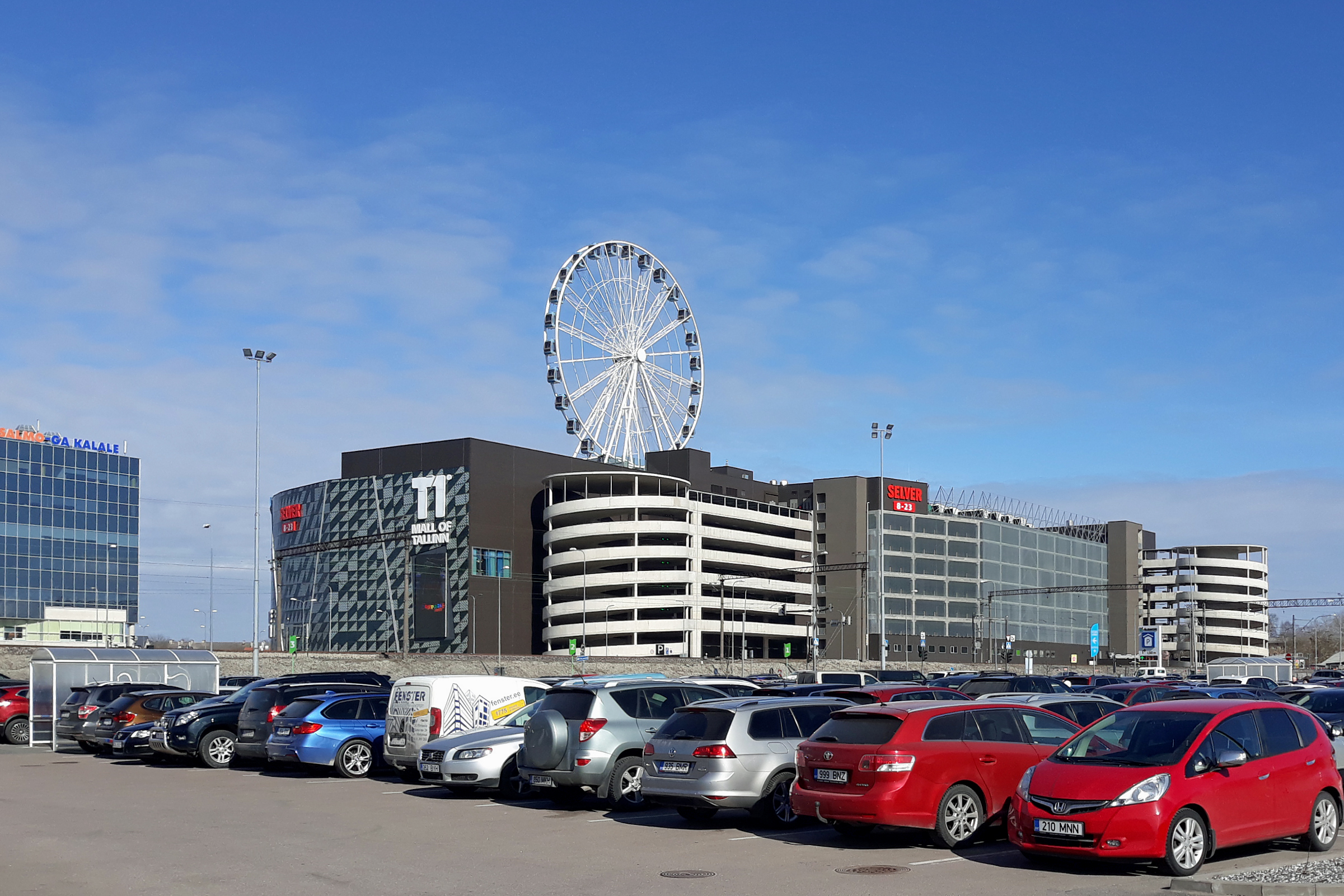 Колесо обозрения на торговом центре Mall of Tallinn, март 2019